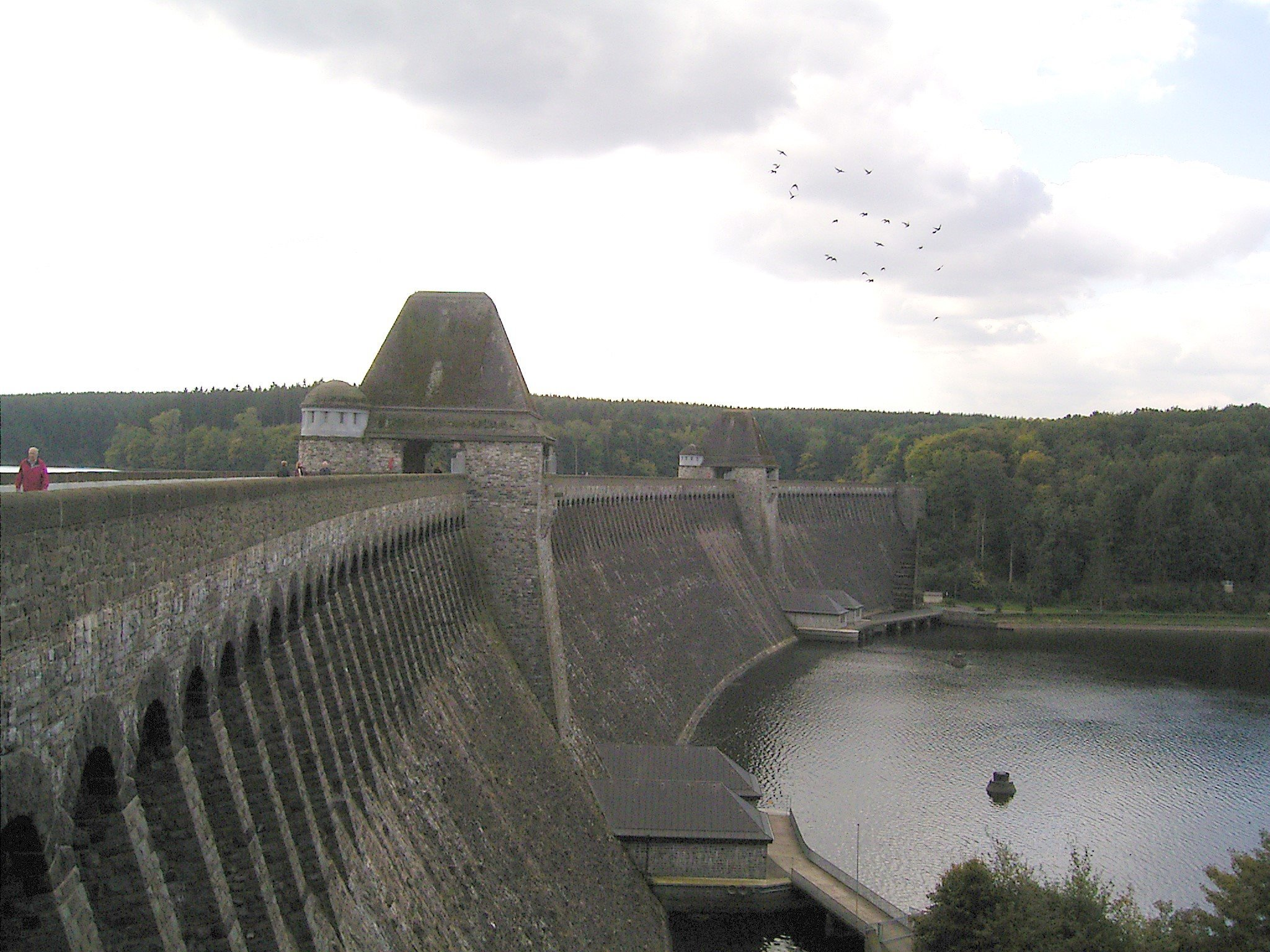 Möhnesee in Möhnesee